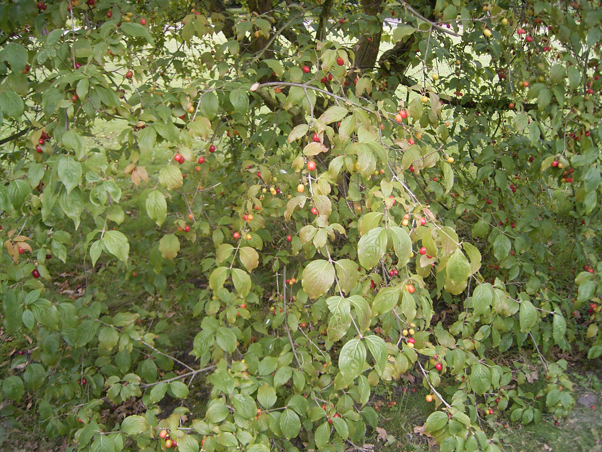 Deze foto toont de Gele kornoelje. Ik nam de foto vandaag op landgoed te Werve in Rijswijk. This photo shows Cornus mas. I took this photo today in Rijswijk, Netherlands.